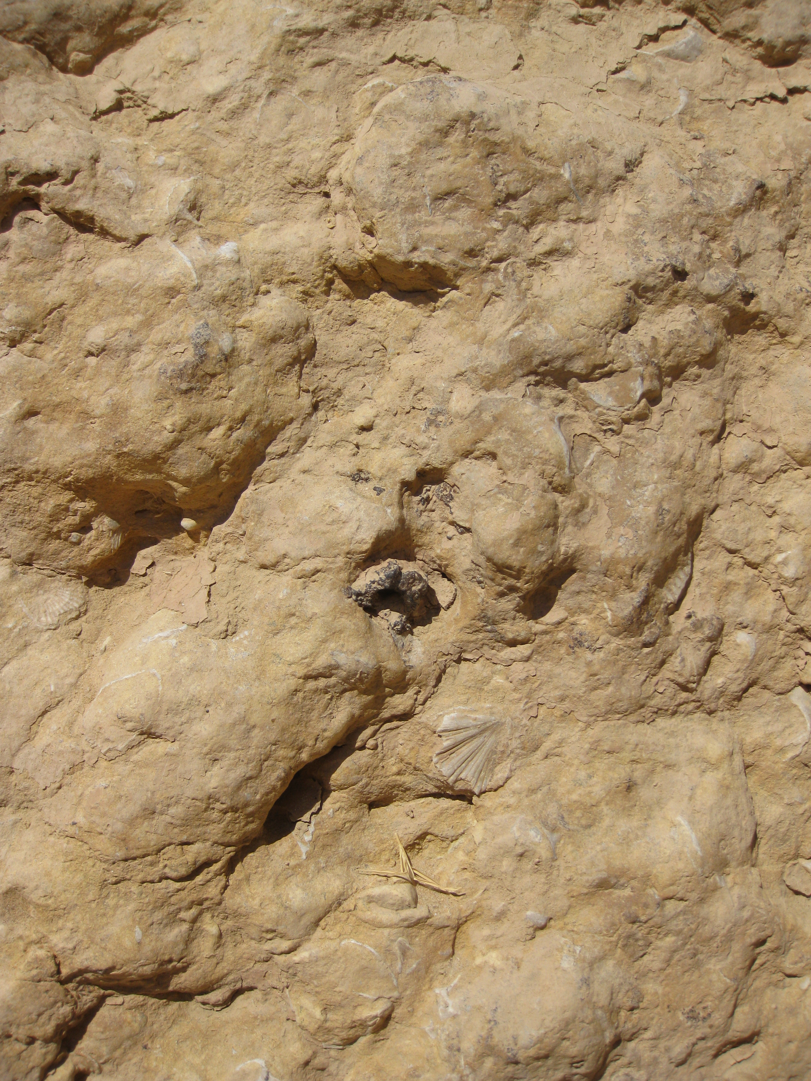 Makhtesh Hatira - HaMakhtesh HaGadol Fossilized shells המכתש הגדול - מכתש חתירה מאובנים